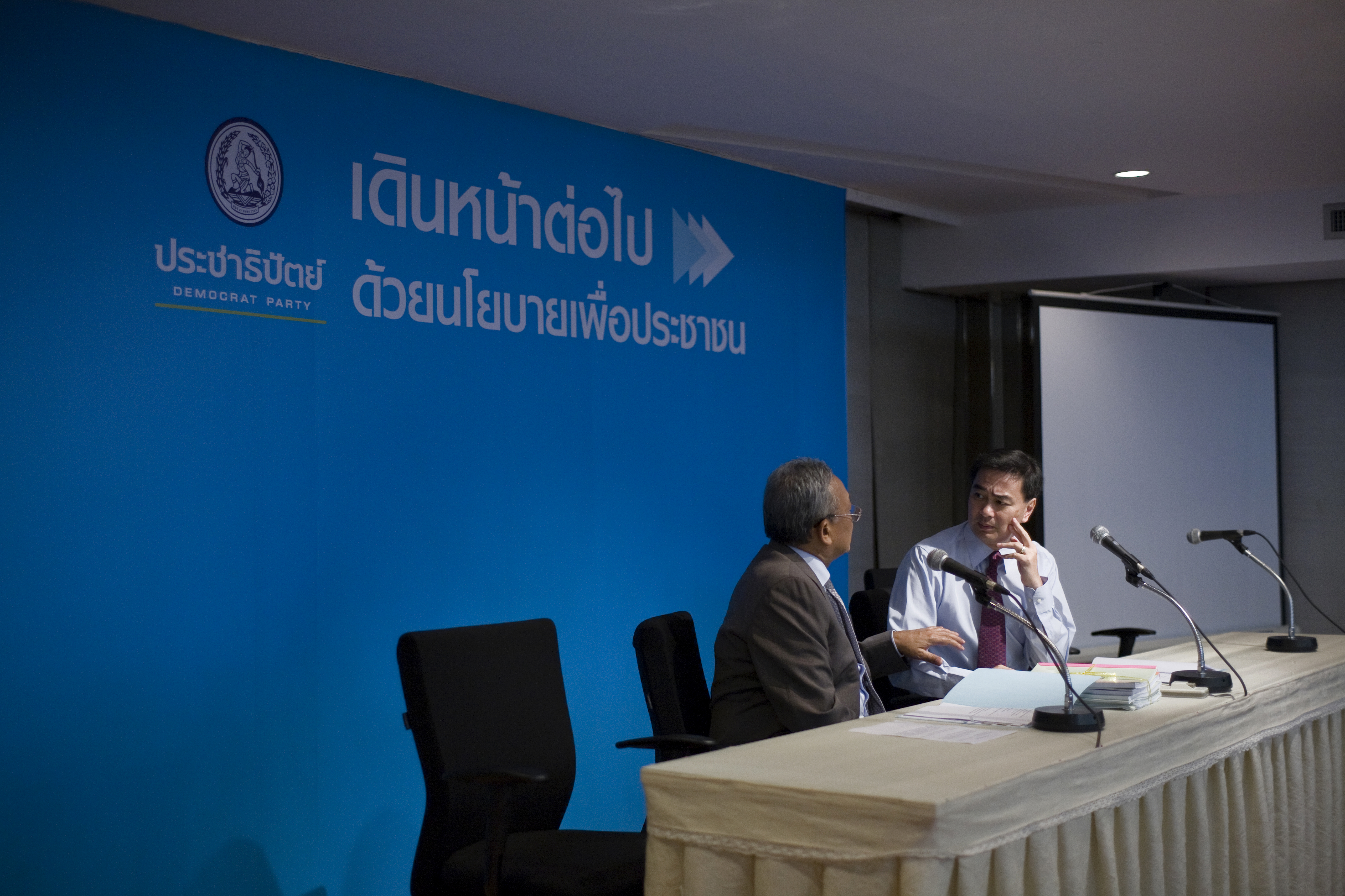 นายกรัฐมนตรี ประชุมคณะกรรมการบริหารพรรคประชาธิปัตย์ และ ส.ส.พรรคประชาธิปัตย์ ณ พรรคประชาธิปัตย์ วันจันทร์ที่14 มีนาคม พ.ศ.2554 (Photographer attached to the Prime Minister of the Kingdom of Thailand (H.E.Mr.Abhisit Vejjajiva) : Peerapat Wimolrungkarat / พีรพัฒน์ วิมลรังครัตน์) @is50mm